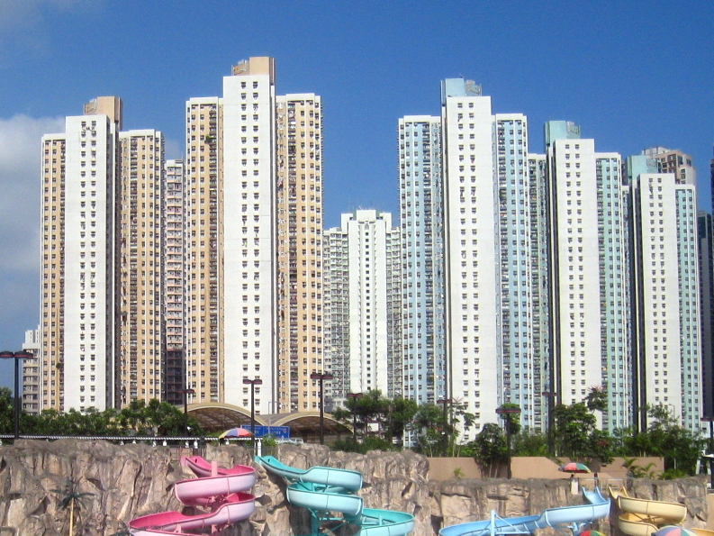 Chung Ming Court